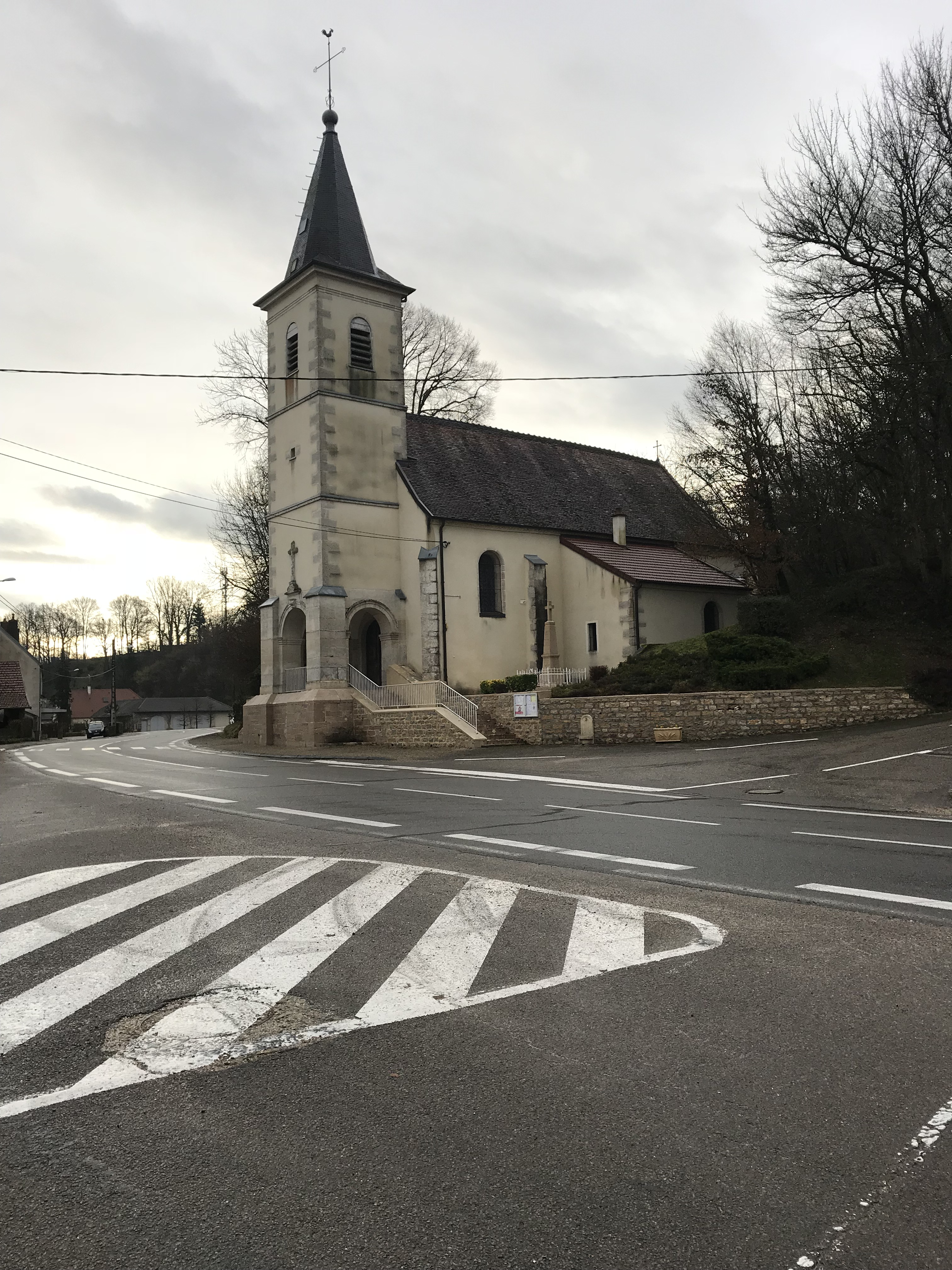 Nevy-lès-Dole (Jura, France) le 6 janvier 2018.